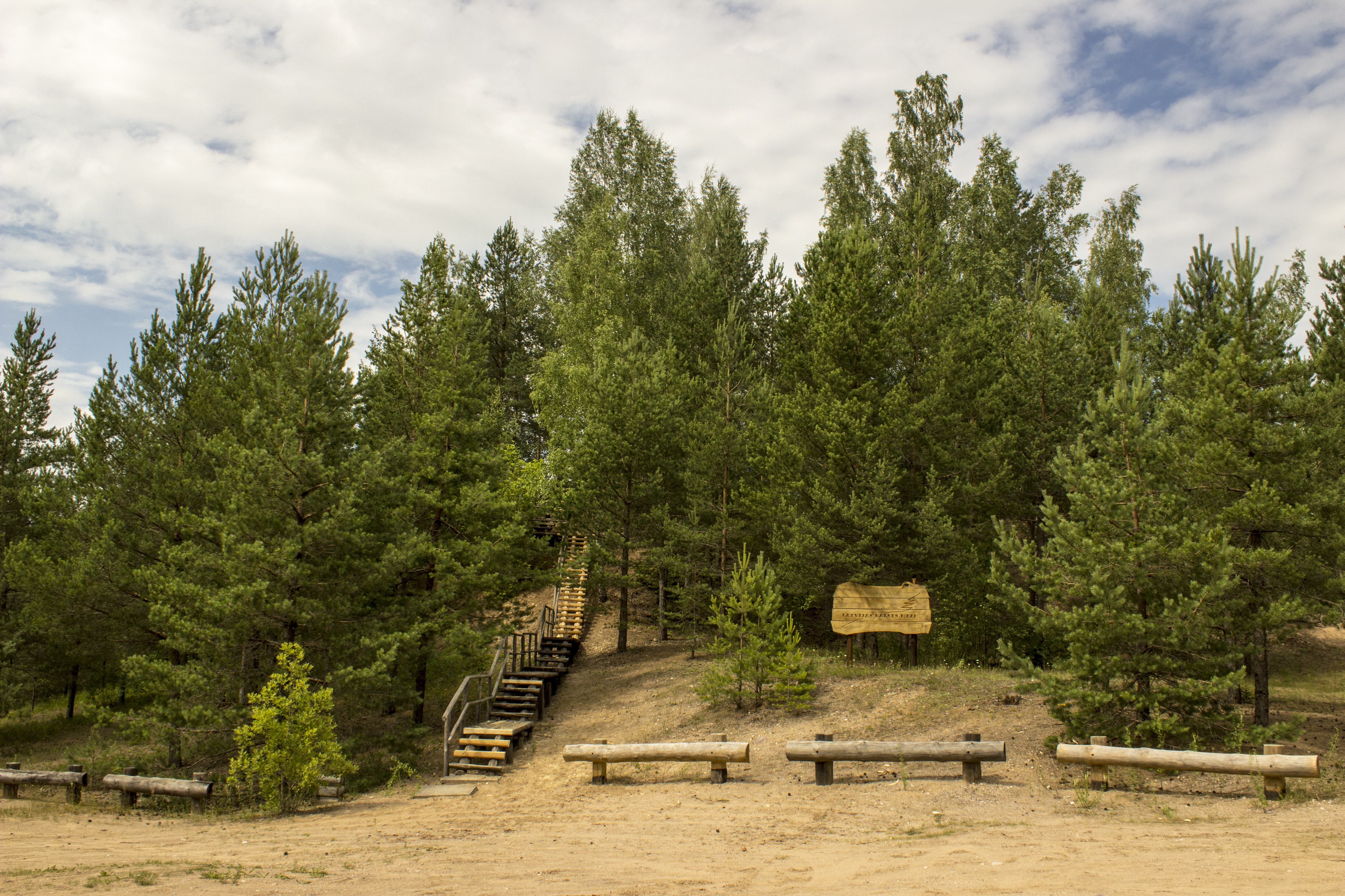 Smiltiņkalns